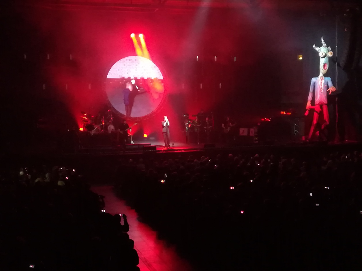 Australian Pink Floyd koncertanta en Niorto la 21-an de marto 2018